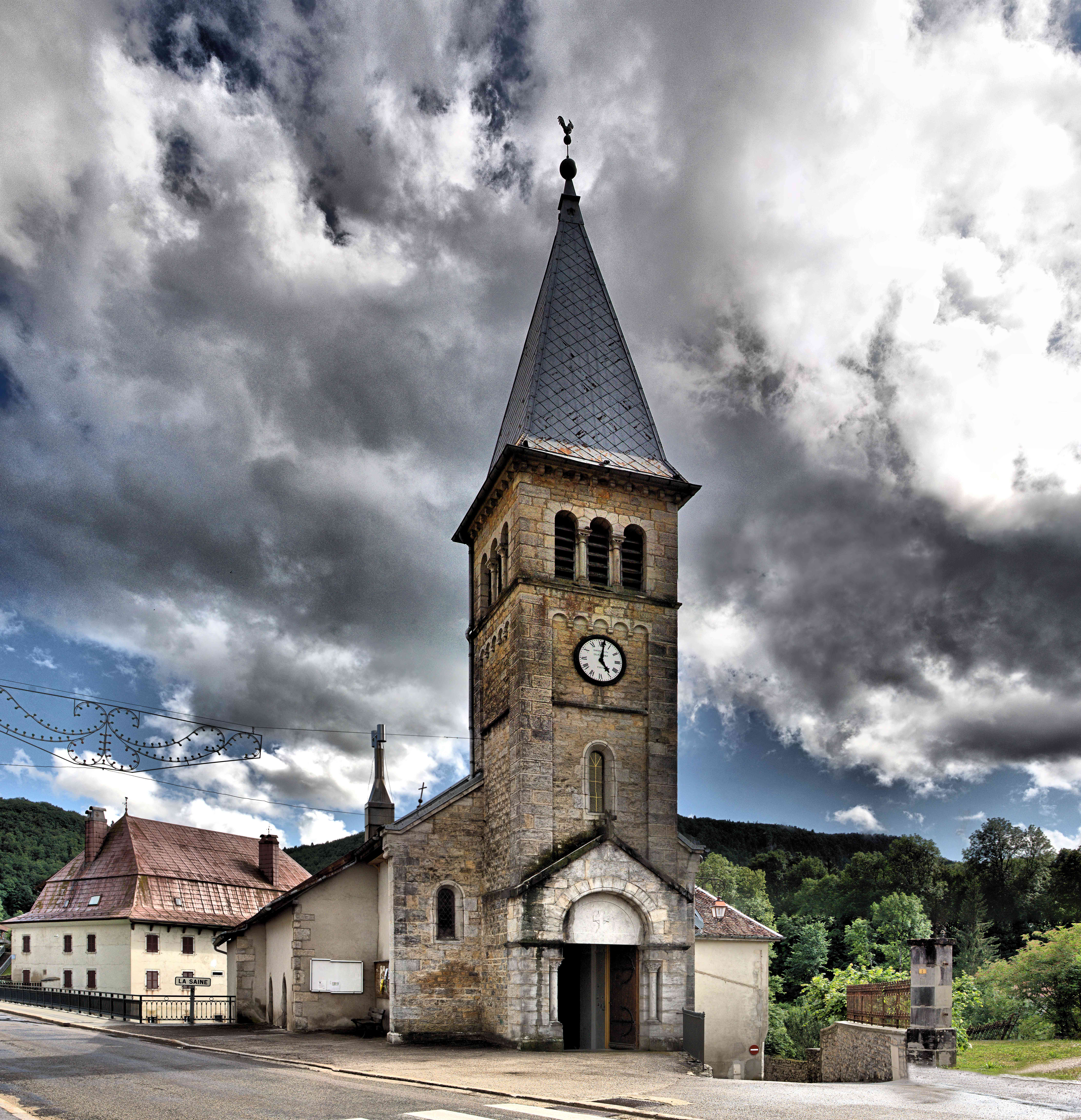 Eglise Saint Antoine - Les Planches en Montagne